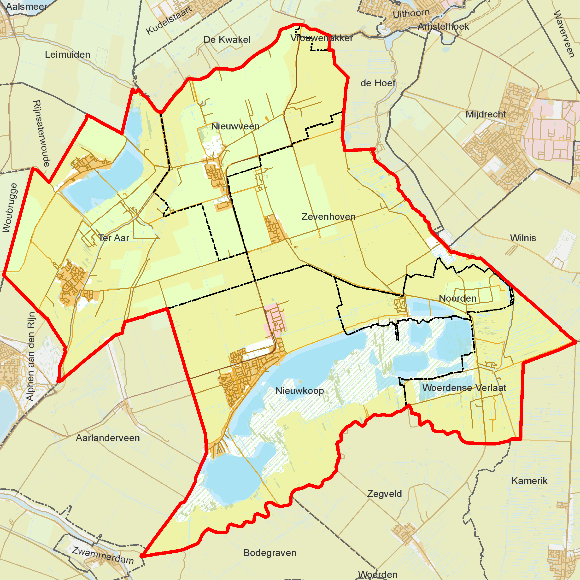 BAG woonplaatsen - Gemeente Nieuwkoop.png